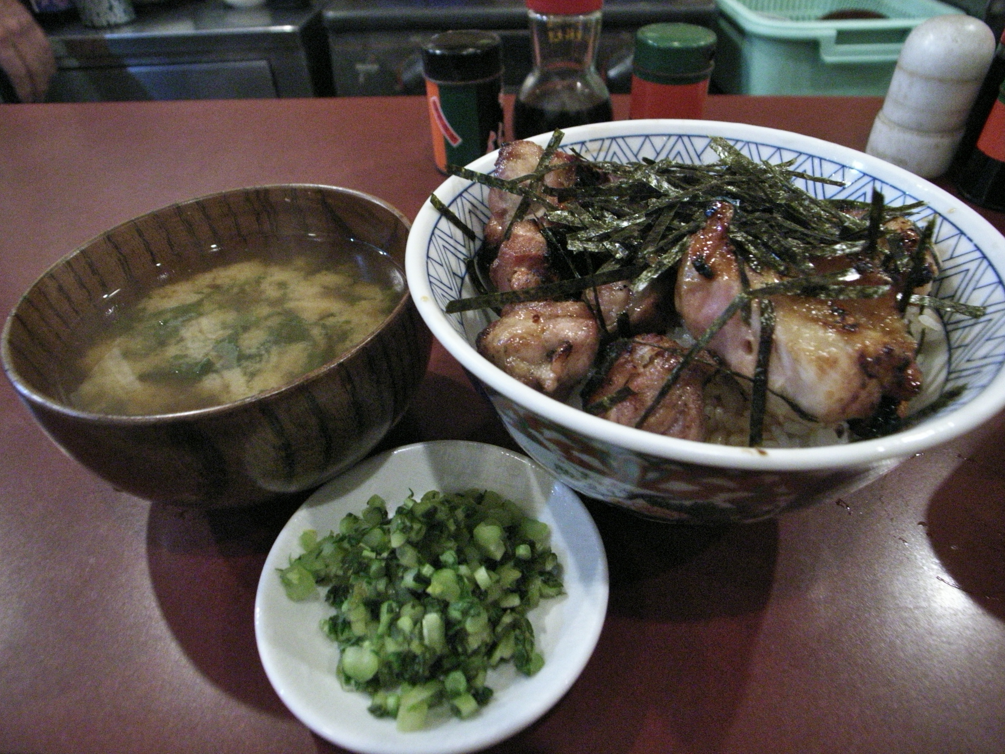 yakitori-don,komebana tsukiji,tokyoFoodCourt